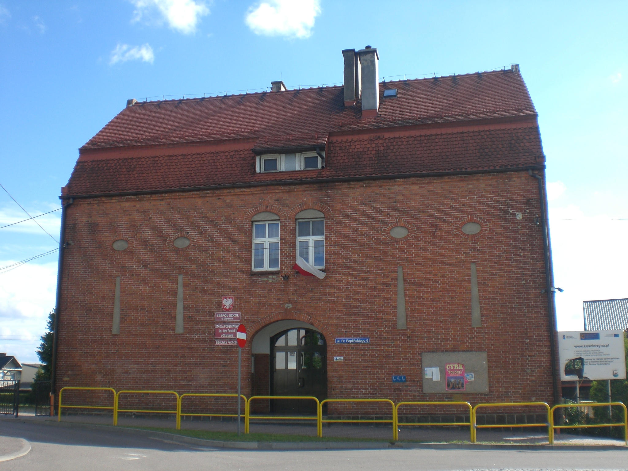 Skorzewo